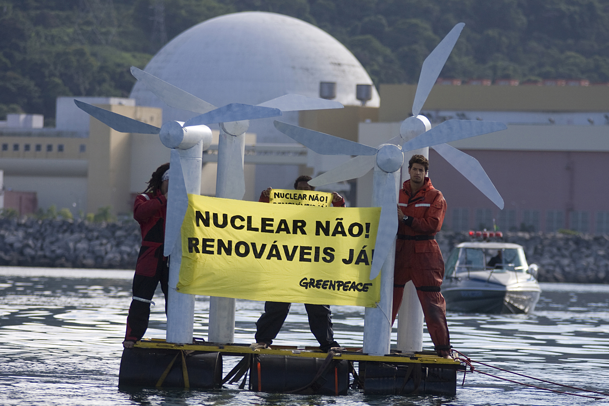 Angra dos Reis, Rio de Janeiro. 07/04/2009. Ativistas do Greenpeace instalam balsa flutuante com quatro turbinas eólicas simbólicas em frente às usinas nucleares de Angra dos Reis (RJ) para protestar contra os investimentos do governo brasileiro na construção de Angra 3 enquanto o potencial eólico do país é desprezado. Esta foi a última atividade da expedição "Salvar o Planeta. É Agora ou Agora" que, desde janeiro, percorreu sete cidades brasileiras para debater com a sociedade, indústria e governo soluções reais para combater o aquecimento global.